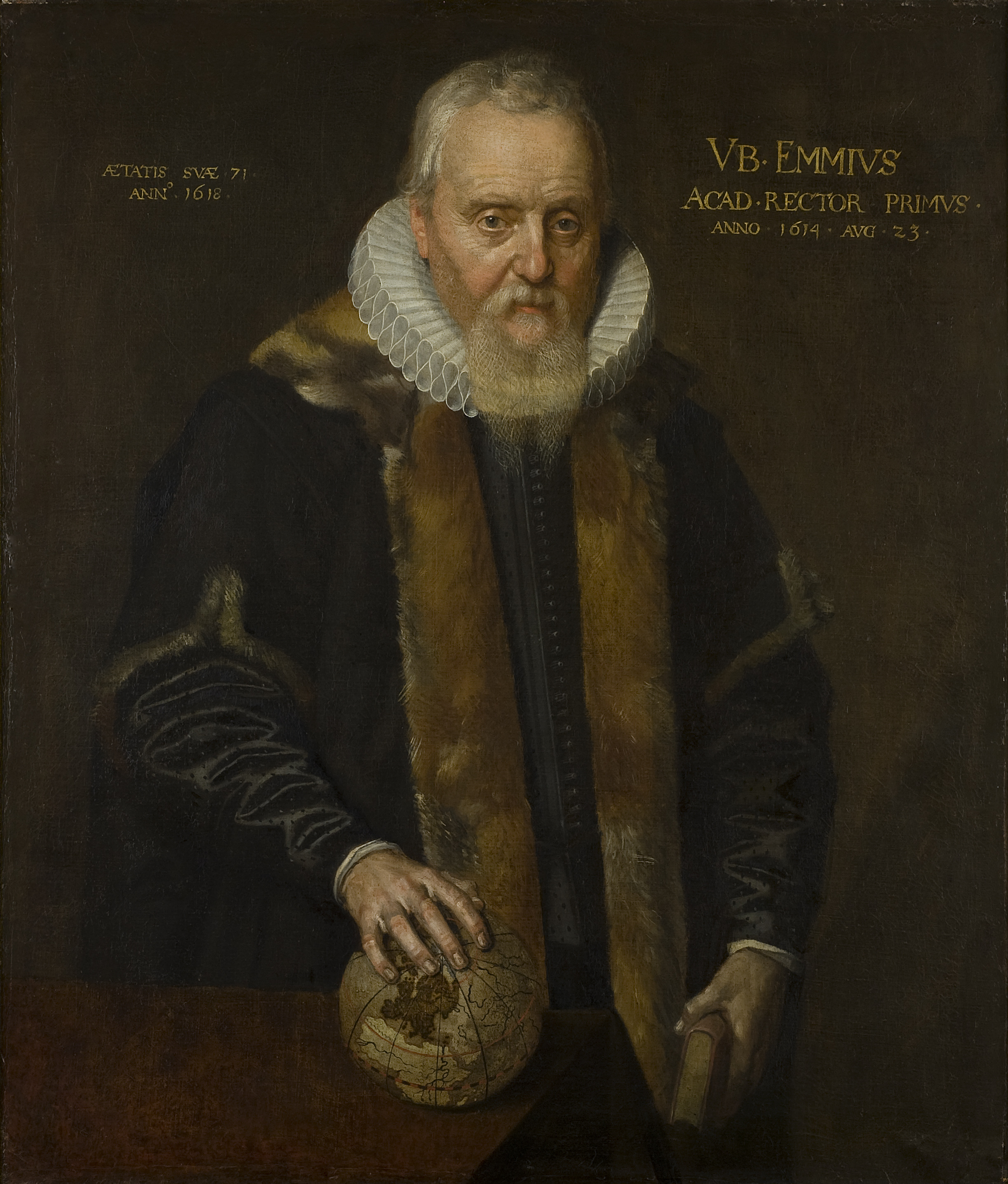 Ubbo Emmius. heupstuk, frontaal, aanziend, staande achter een tafel, de rechterhand rustend op een op tafel liggende wereldbol, in de linkerhand een boek. grijs kostuum, toga met bontrand, gepijpte kraag; grijs haar, baard, snor. bruine achtergrond. opschrift links naast hoofd: Aetatis suae. 71. Anno 1618. rechts naast het hoofd: Ub.Emmius Rector Primus Anno. 1614. AUG. 23.